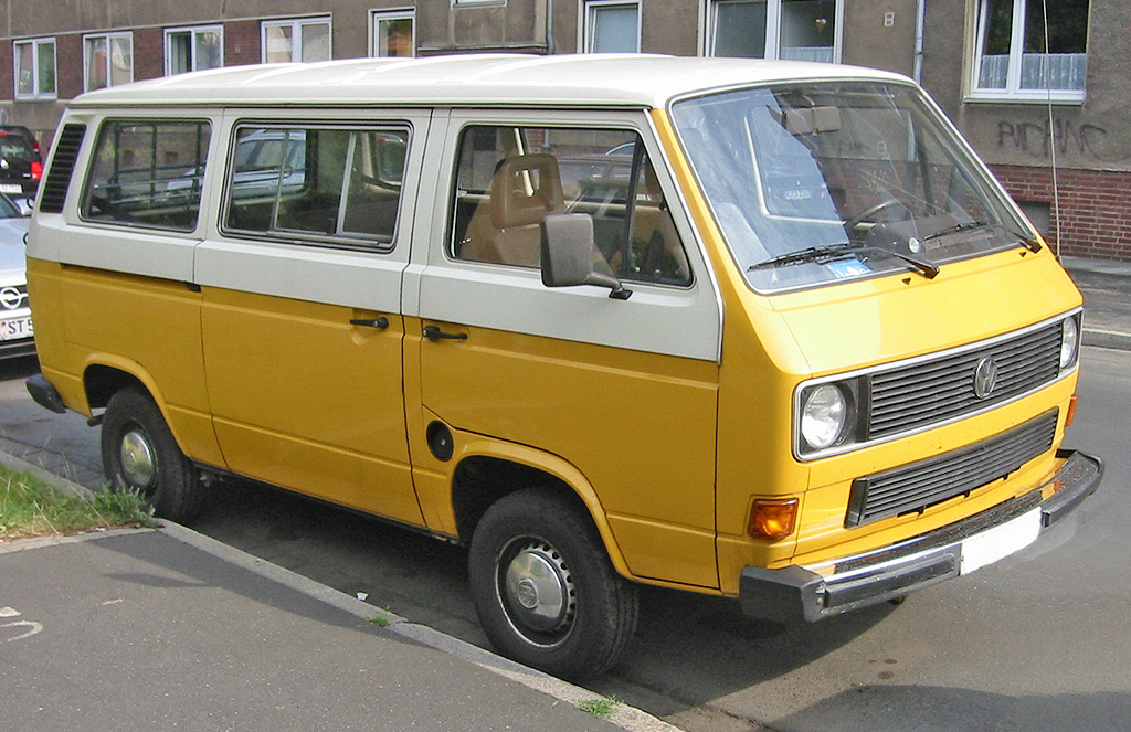 VW Transporter T3, wassergekühlt